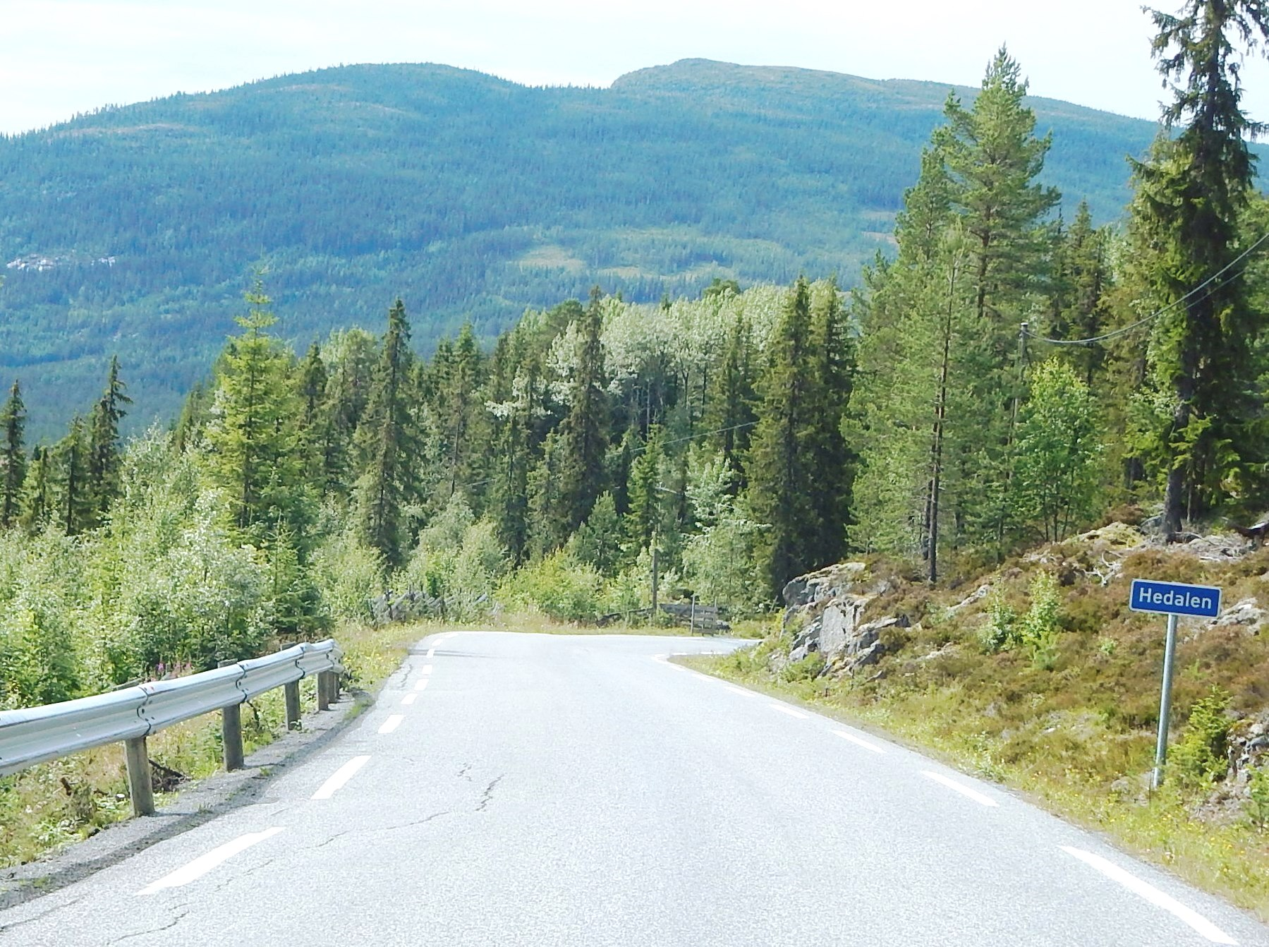 Fylkesvei 2456 (tidl. 225) i Hedalen